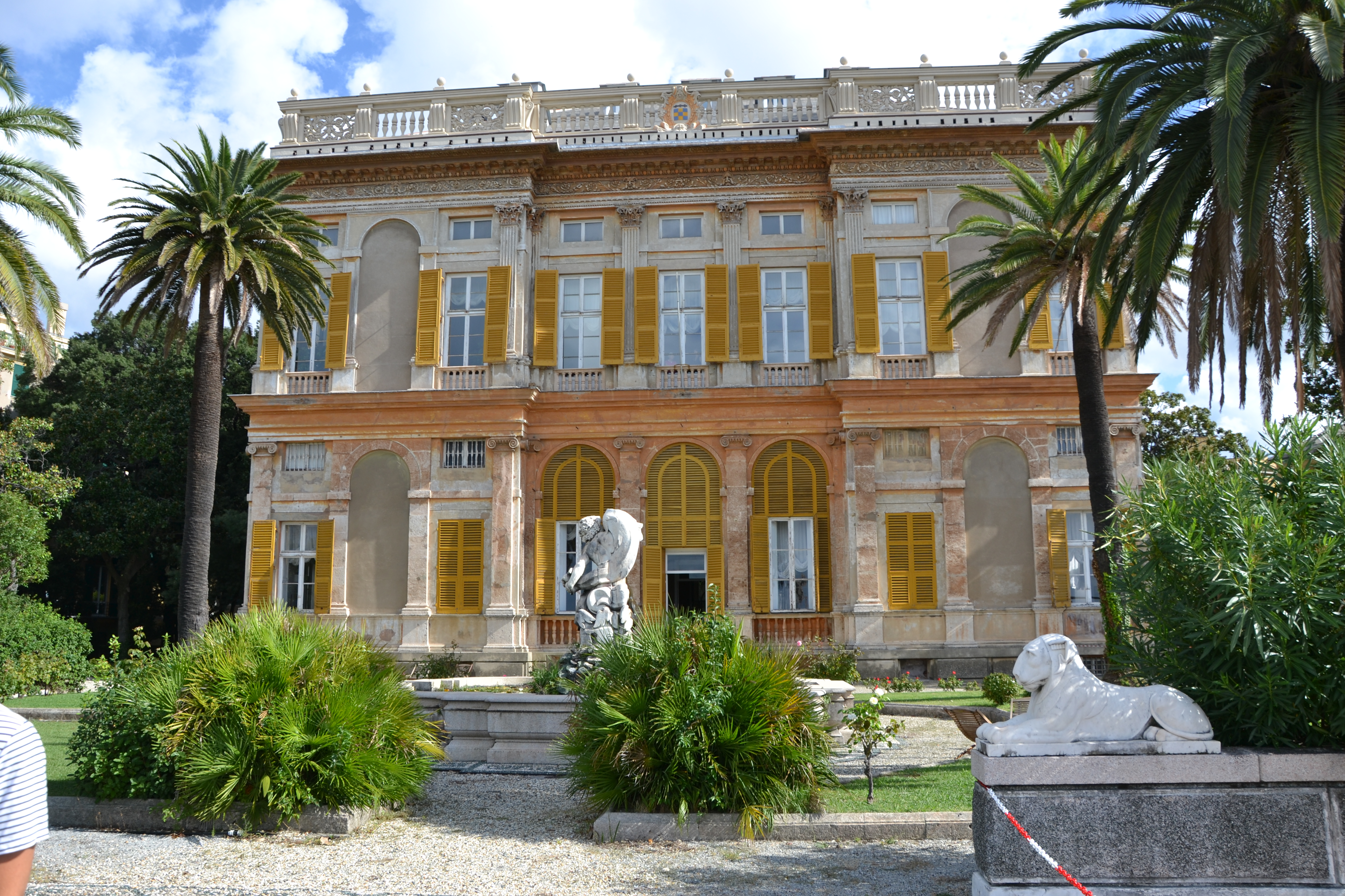 Villa di Tobia Pallavicino detta delle Peschiere, Genova, (1560), su progetto di Galeazzo Alessi e Giovanni Battista Castello detto il Bergamasco. Saloni affrescati da Luca Cambiaso e Giovanni Battista Castello.